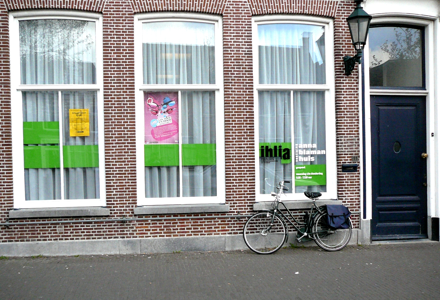 Voormalig Anna Blamanhuis, Noordvliet 11, Leeuwarden. (V.h. IHLIA-vestiging)